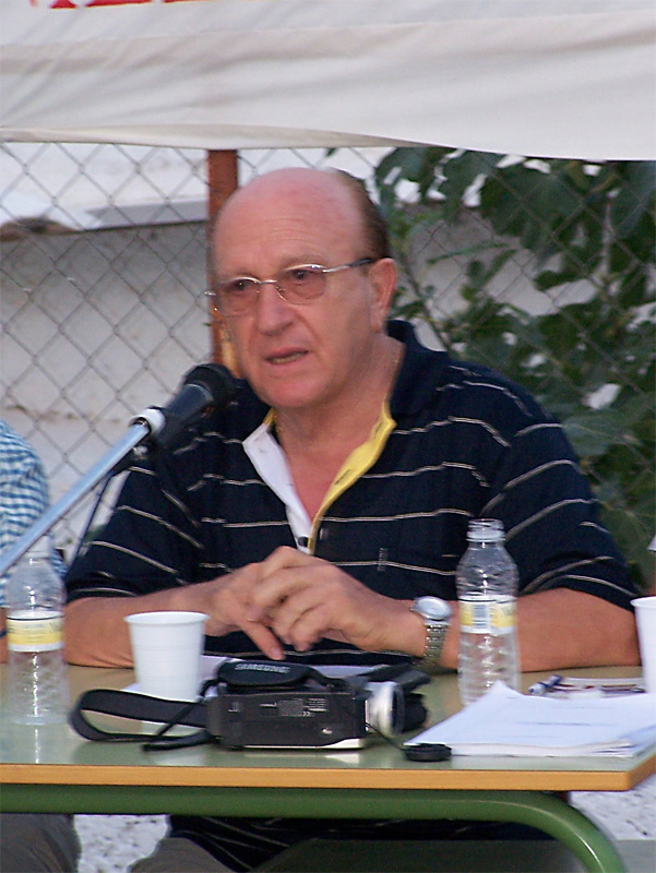 Miguel J. Carrascosa Salas en el acto de presentación de un libro. Recorte de la fotografía original en la que aparecen otras personas.